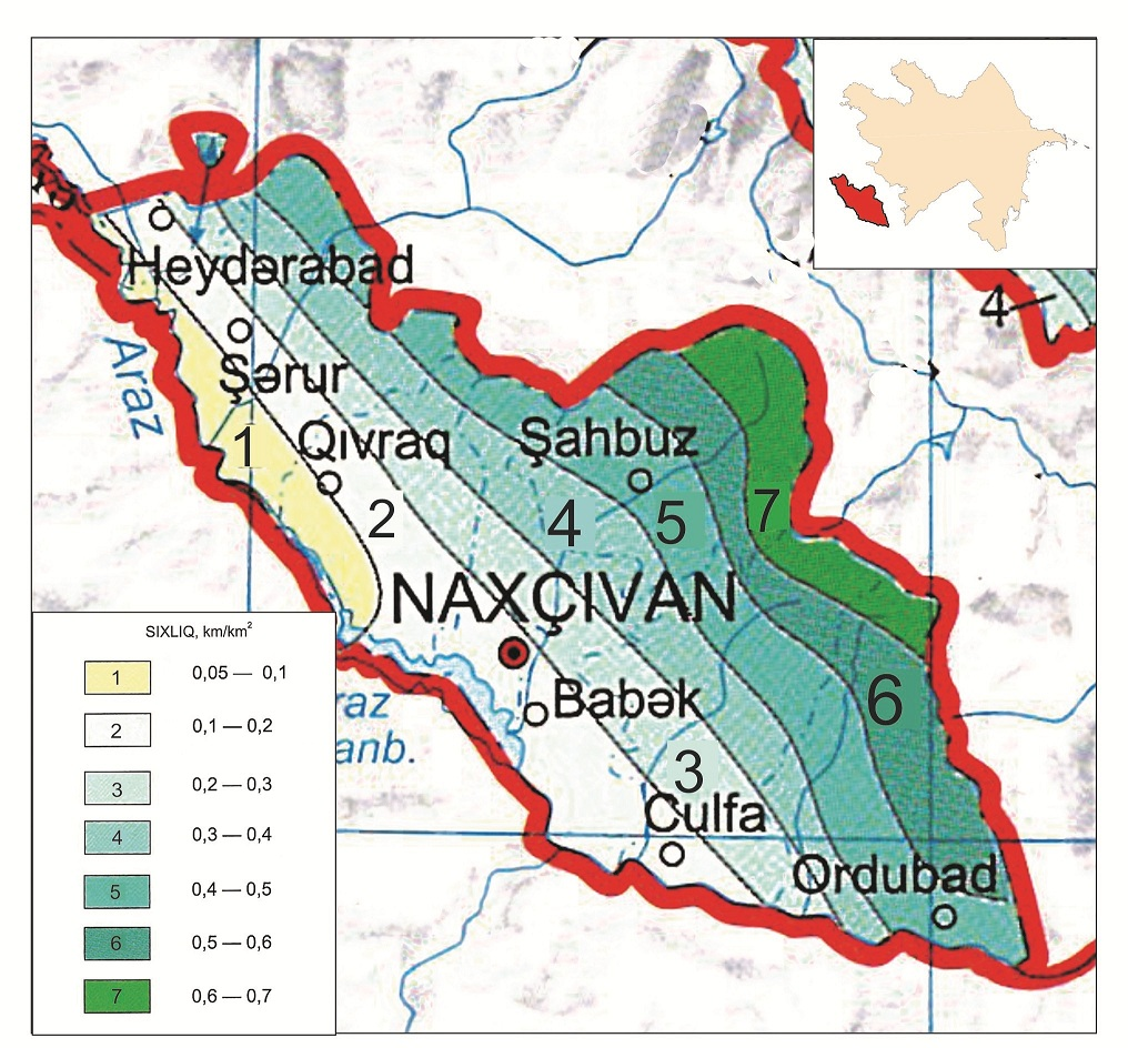 Orta Araz təbii vilayətinin çay şəbəkəsinin sıxlığı2